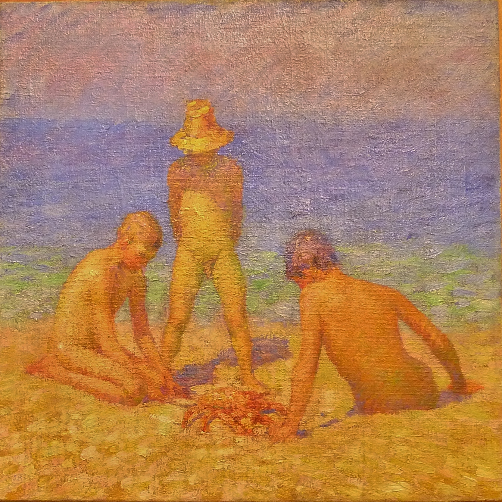 John Peter Russell : Fils du peintre jouant avec un crabe (huile sur toile, vers 1904-1906, musée des beaux-arts de Morlaix)